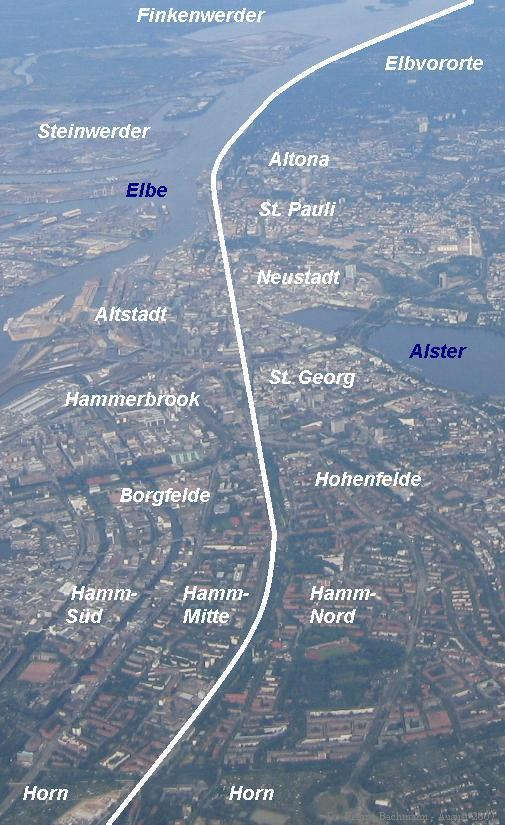 Verlauf des Geesthanges in Hamburg.